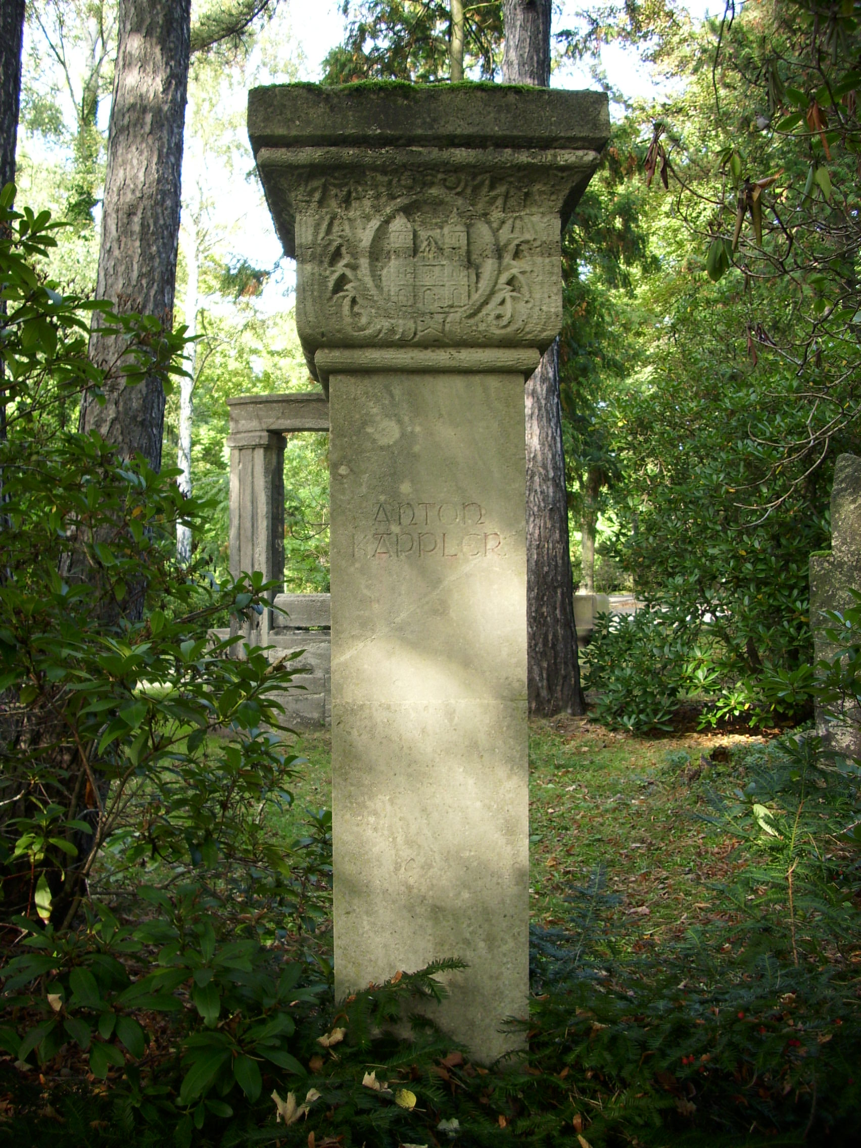 Max Alfred Brumme: Grabmal Anton Käppler auf dem Südfriedhof Leipzig, mit dem Bild eines seiner Hauptwerke, der Liebfrauenkirche in Leipzig-Lindenau.